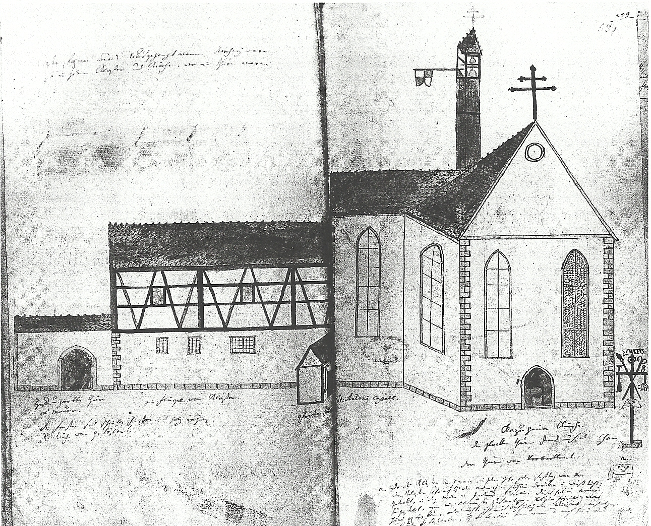 Ansicht des abgegangenen Kapuzinerkloster St. Ulrich (Schwäbisch Gmünd). Zeichnung in der Schwäbisch Gmünder Chronik von Dominikus Debler (um 1800), Stadtarchiv Schwäbisch Gmünd, Bd. 6, S. 530.